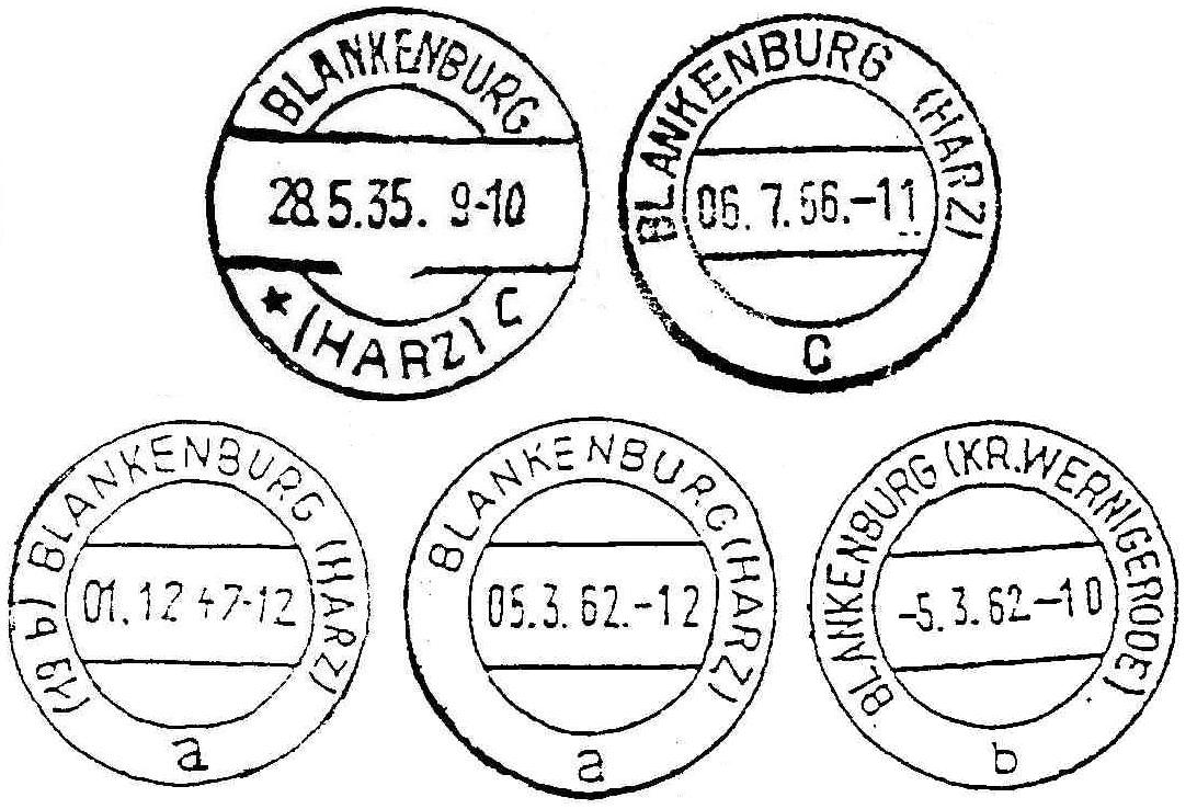 Verschieden Kreisstegstempel, verwendet in Blankenburg